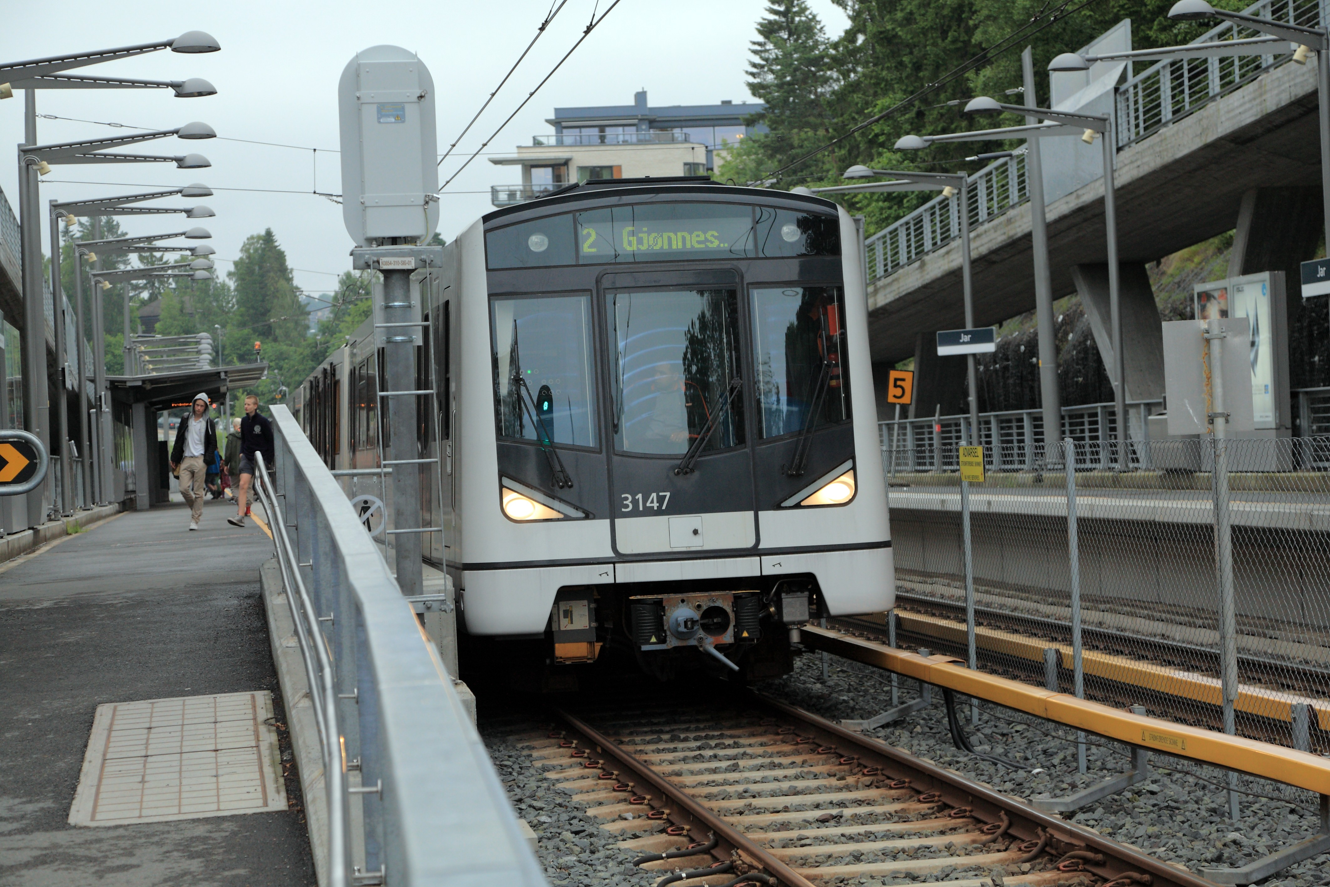 Zug der Reihe MX3000 auf der Linie 2 nach Gjønnes am Hochbahnsteig. Zum Aufnahmezeitpunkt im Sommer 2013 verkehren die U-Bahn-Züge nur über dieses Bahnsteiggleis.